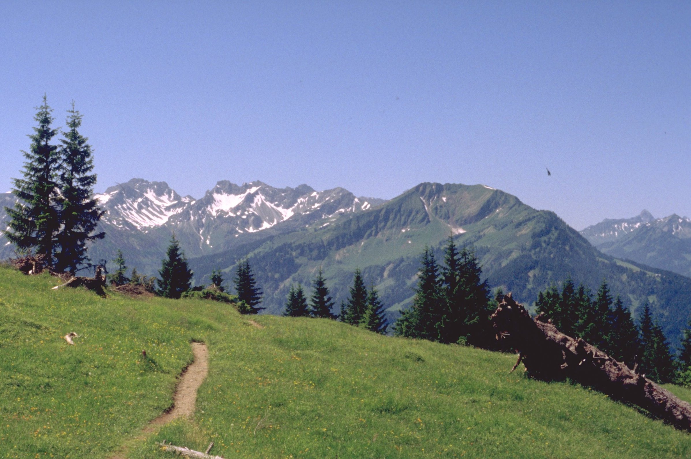 Söllereck vom Rossbichel